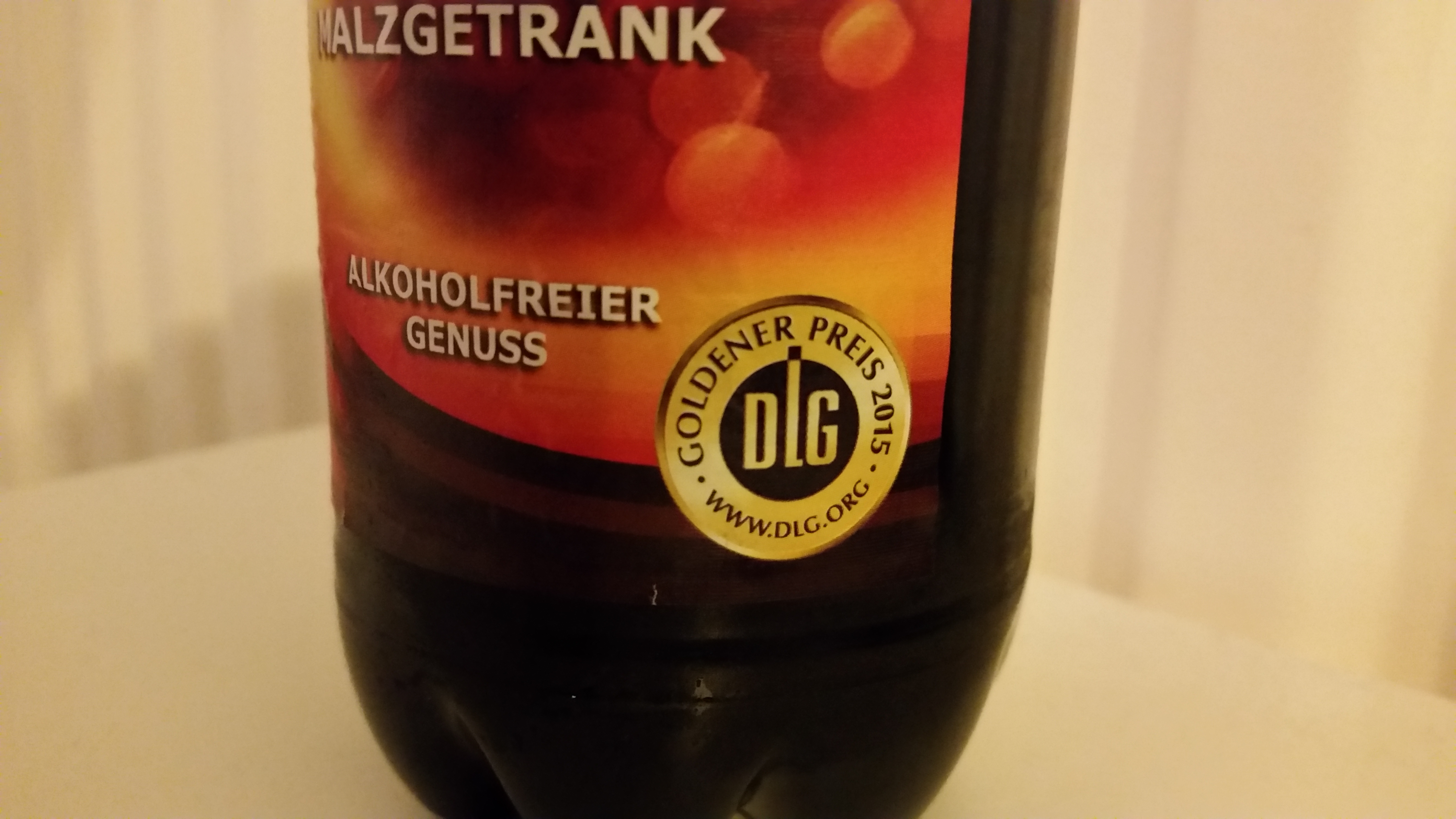 DLG prämiertes Malzbier/Malztrunk